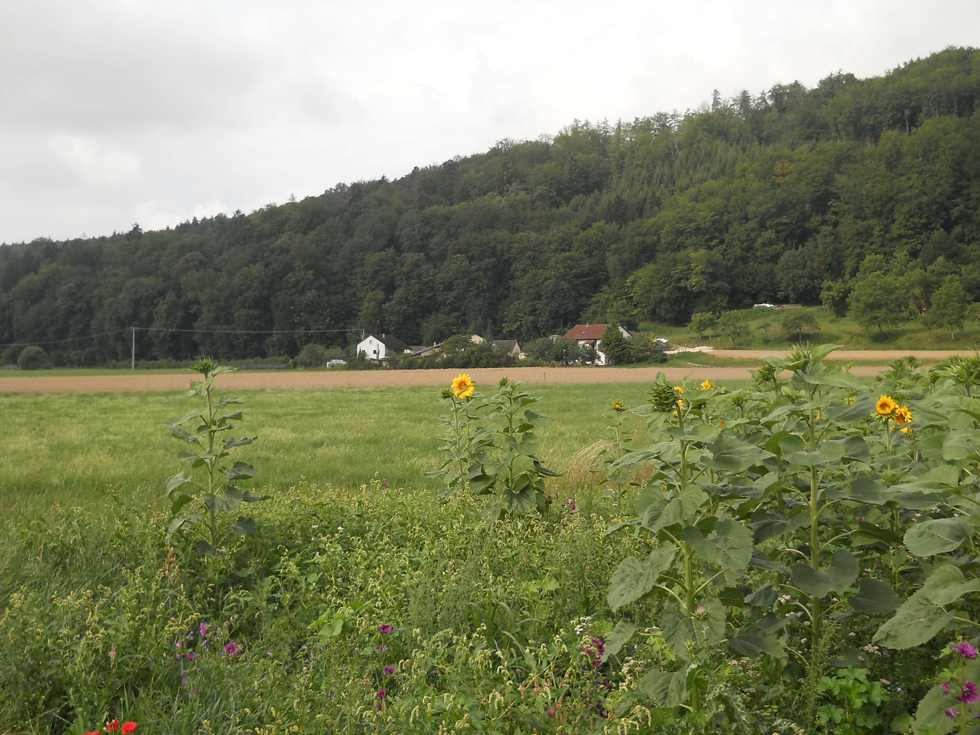 Attenbrunnmühle, Gemeindeteil von Dollnstein im oberbayerischen Landkreis Eichstätt